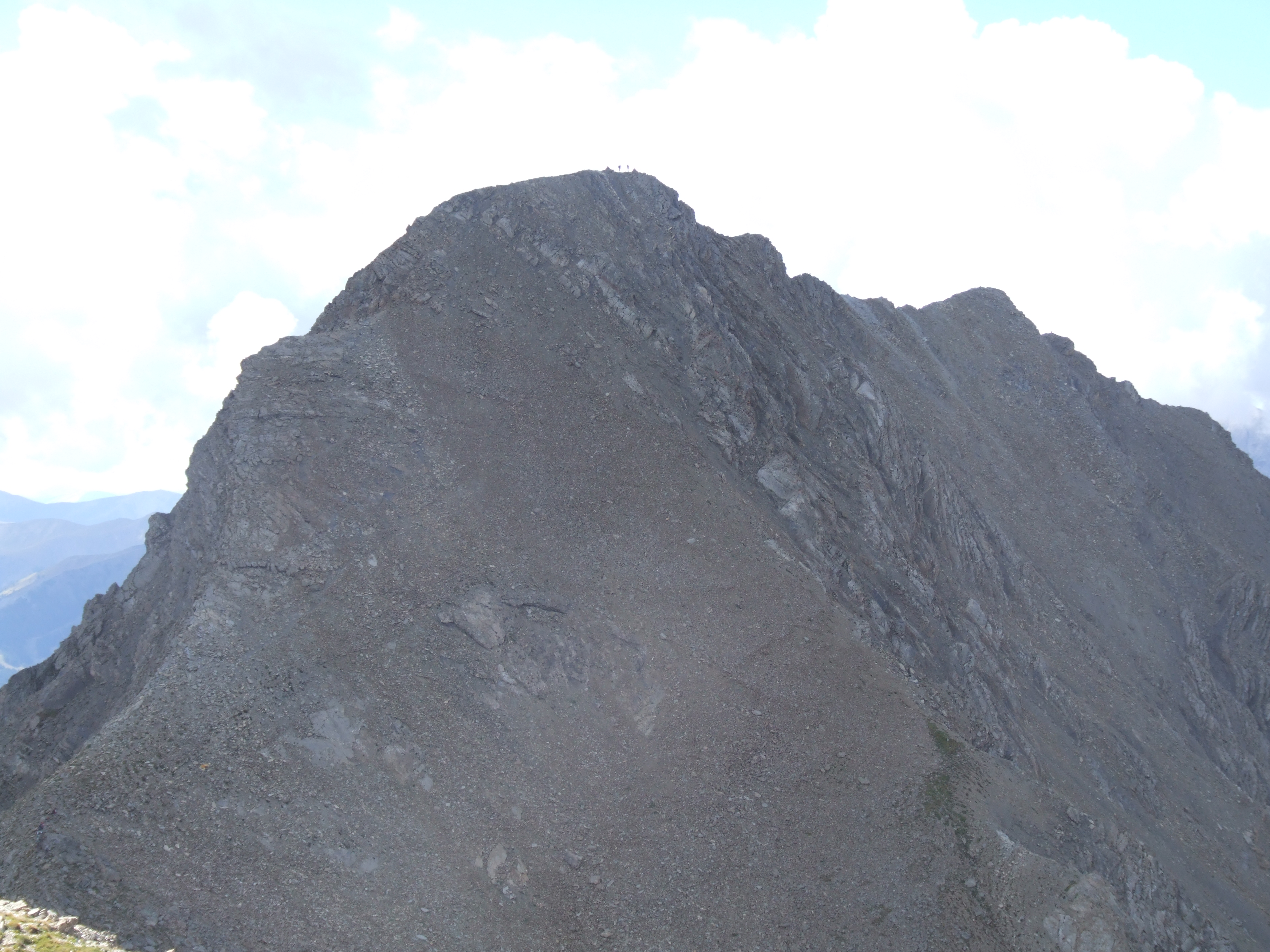 L'Aupillon (alt.2916 m), point culminent des Orres (Hautes-Alpes ; France).